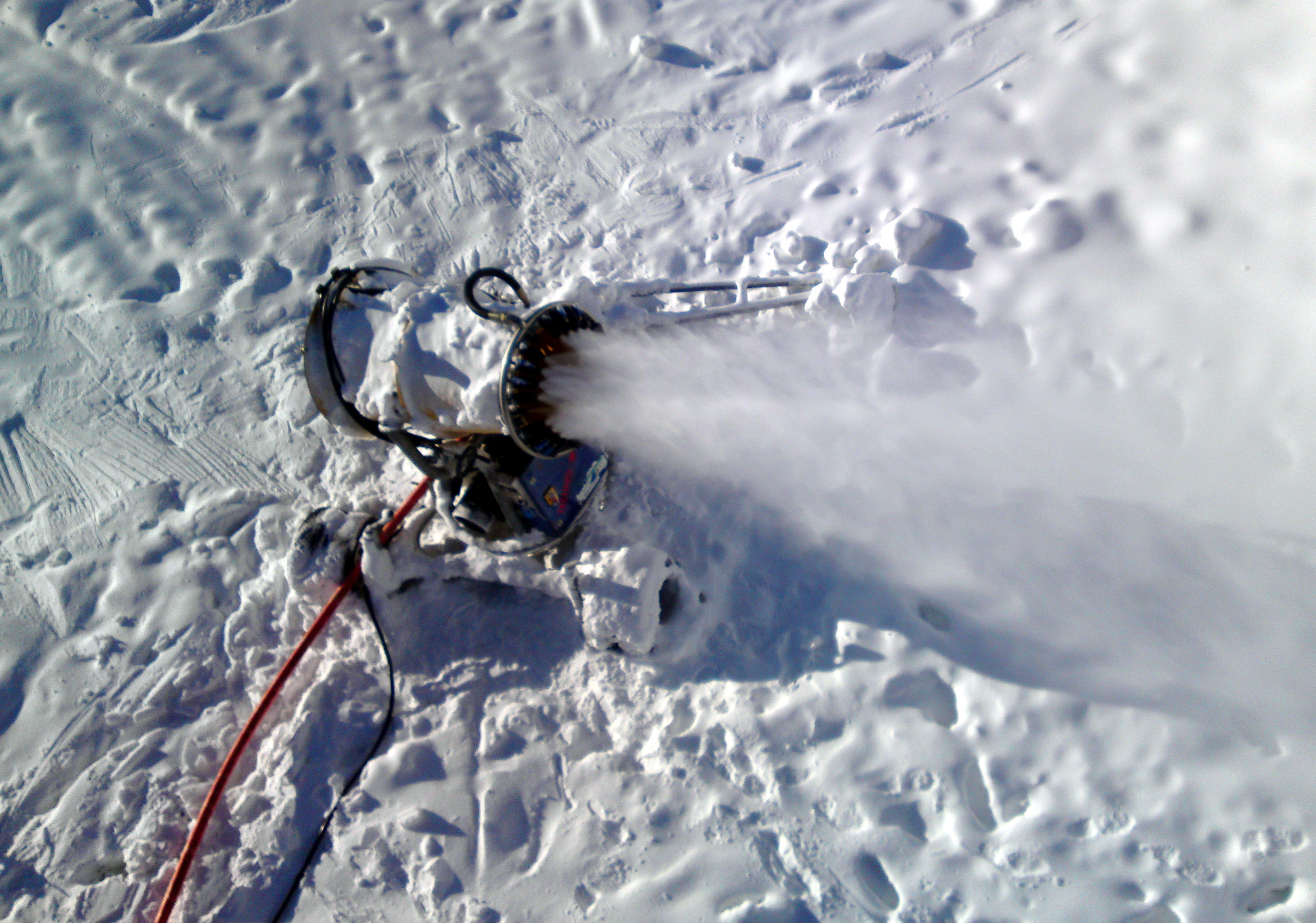 Plejsy, lyžiarske stredisko na východnom Slovensku. Snežné delo.